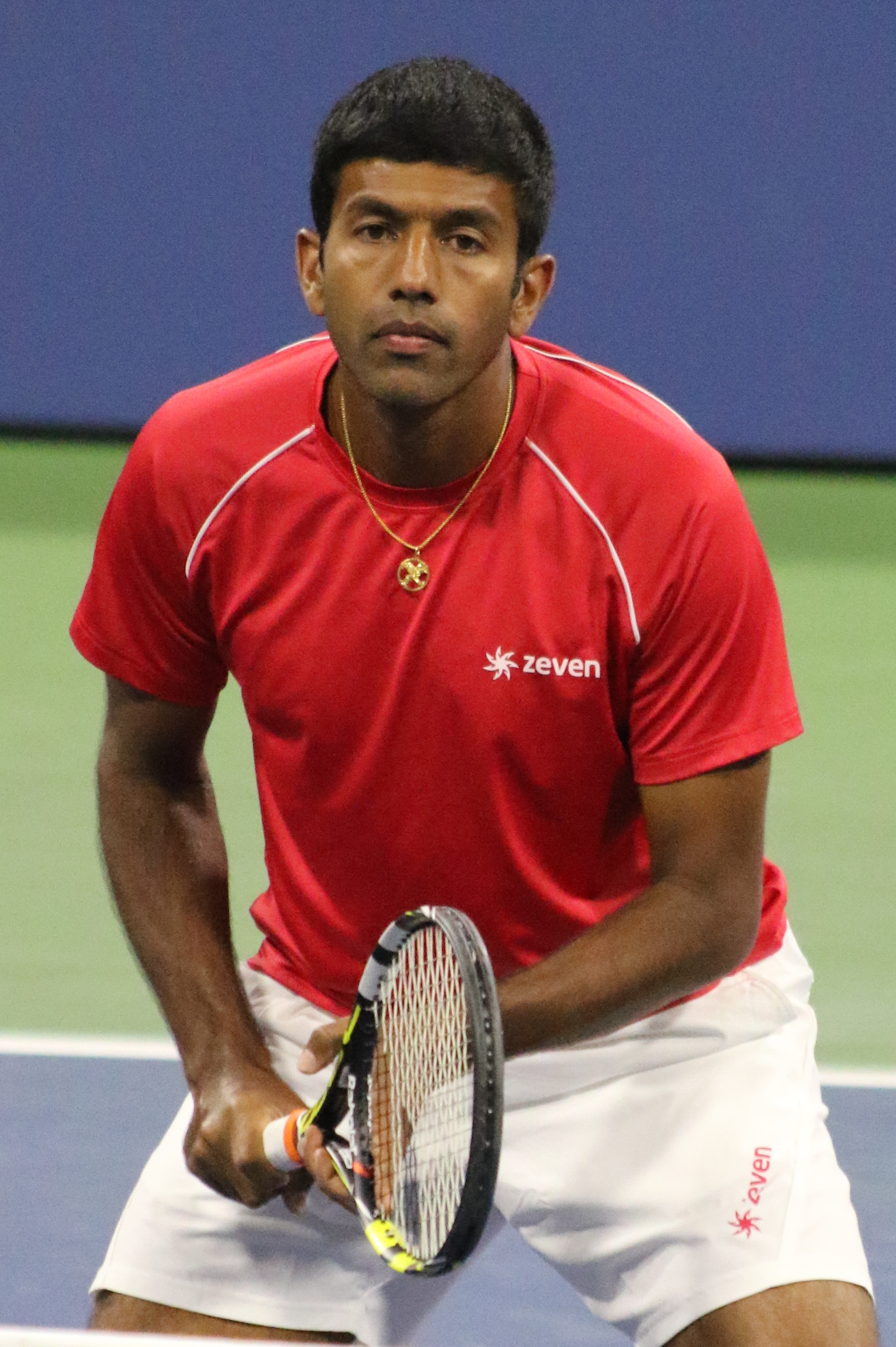 Bopanna US16 (21)